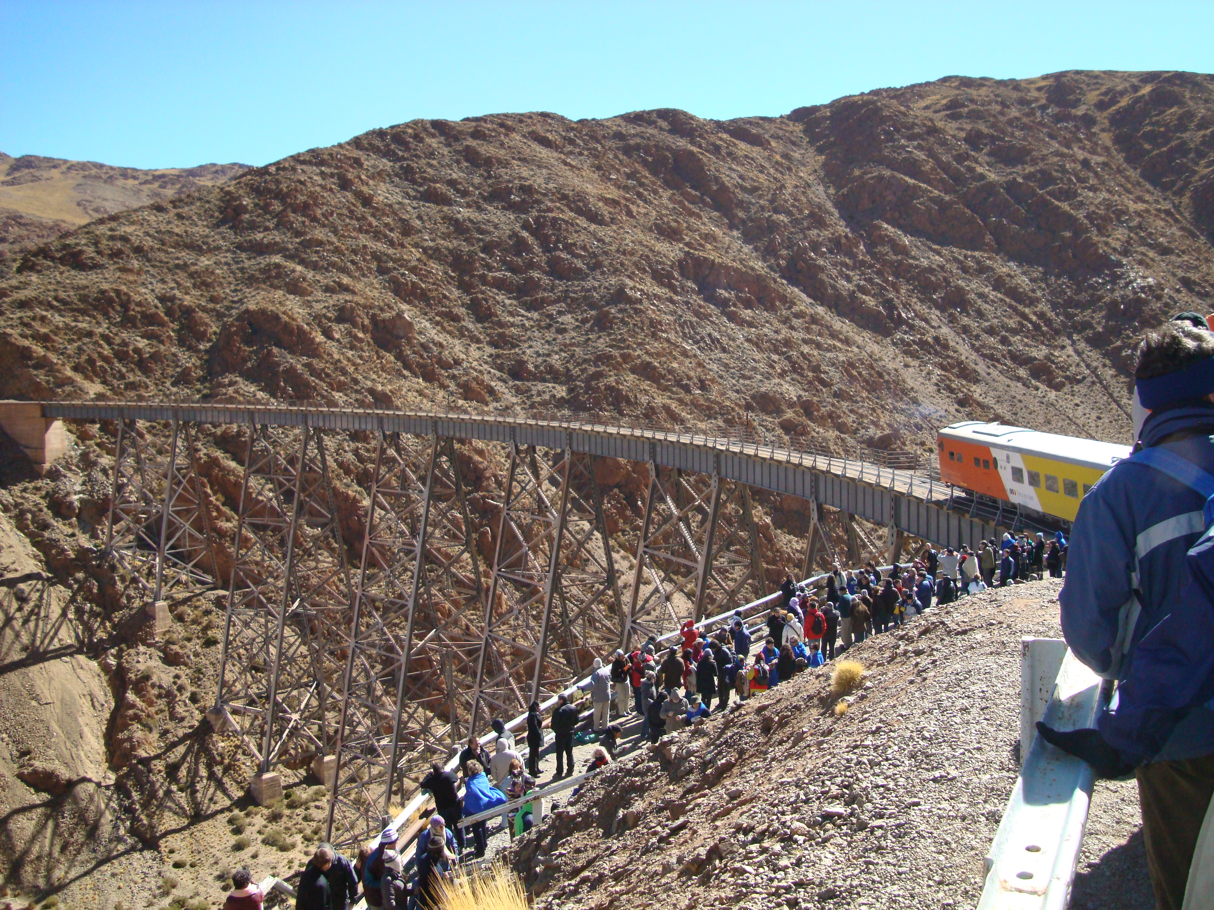 Tren a las Nubes, viaducto La Polvorilla